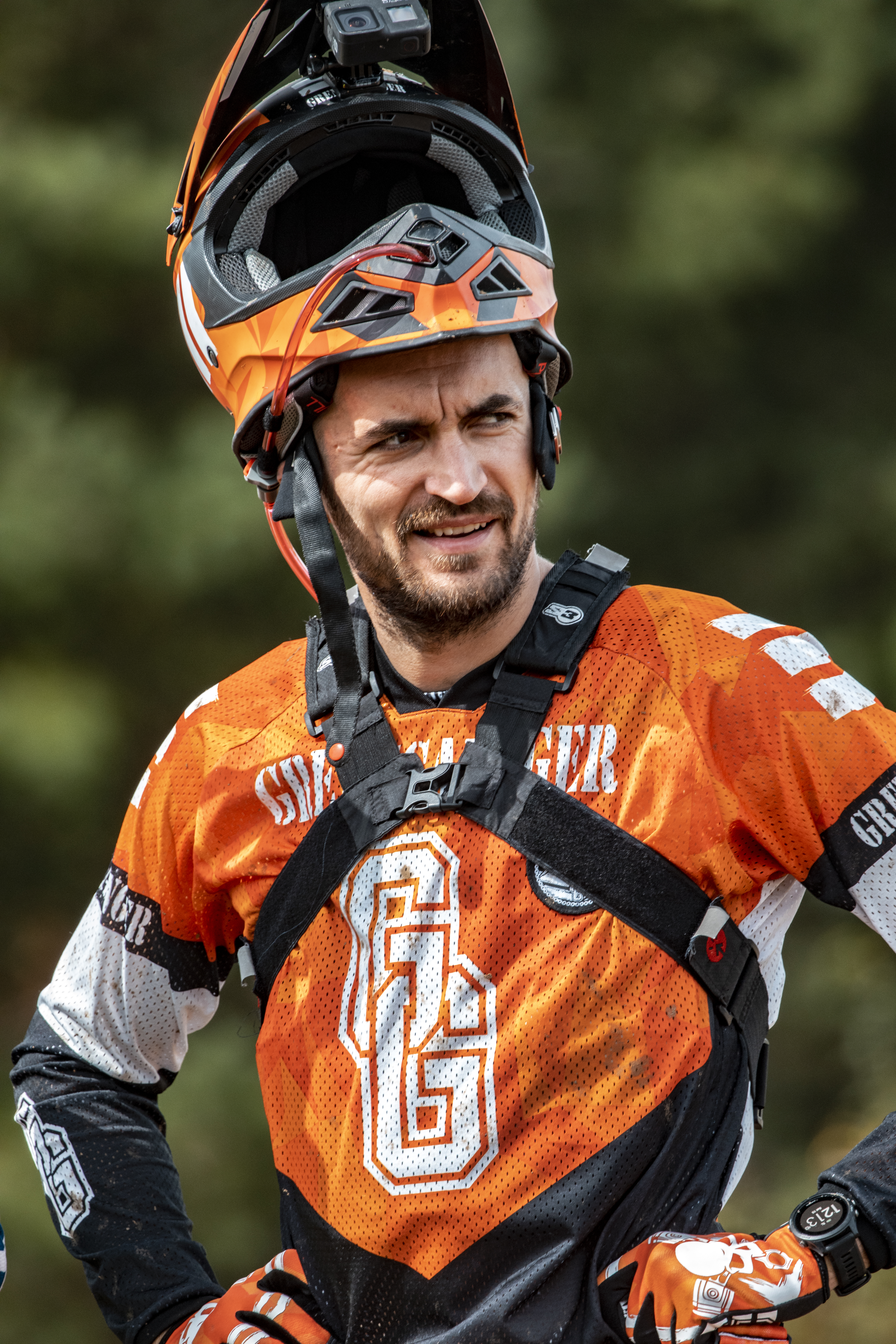 Российский мотогонщик Илья Маликов